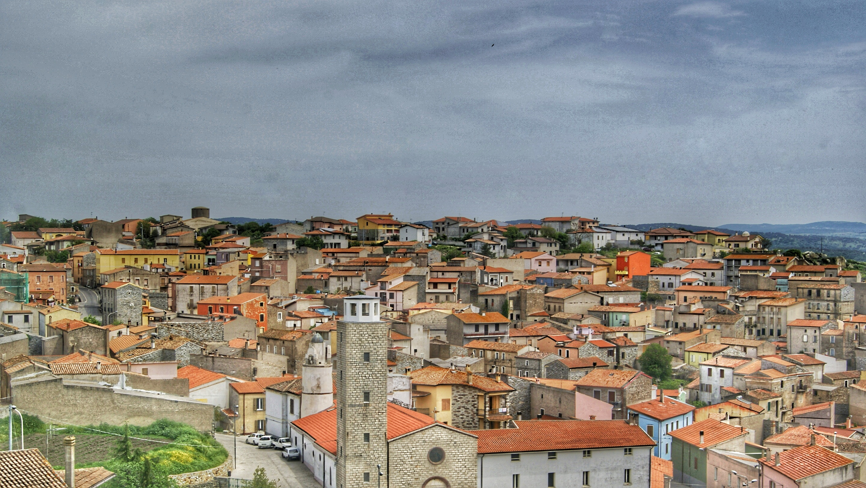 Vista del paese di Nule